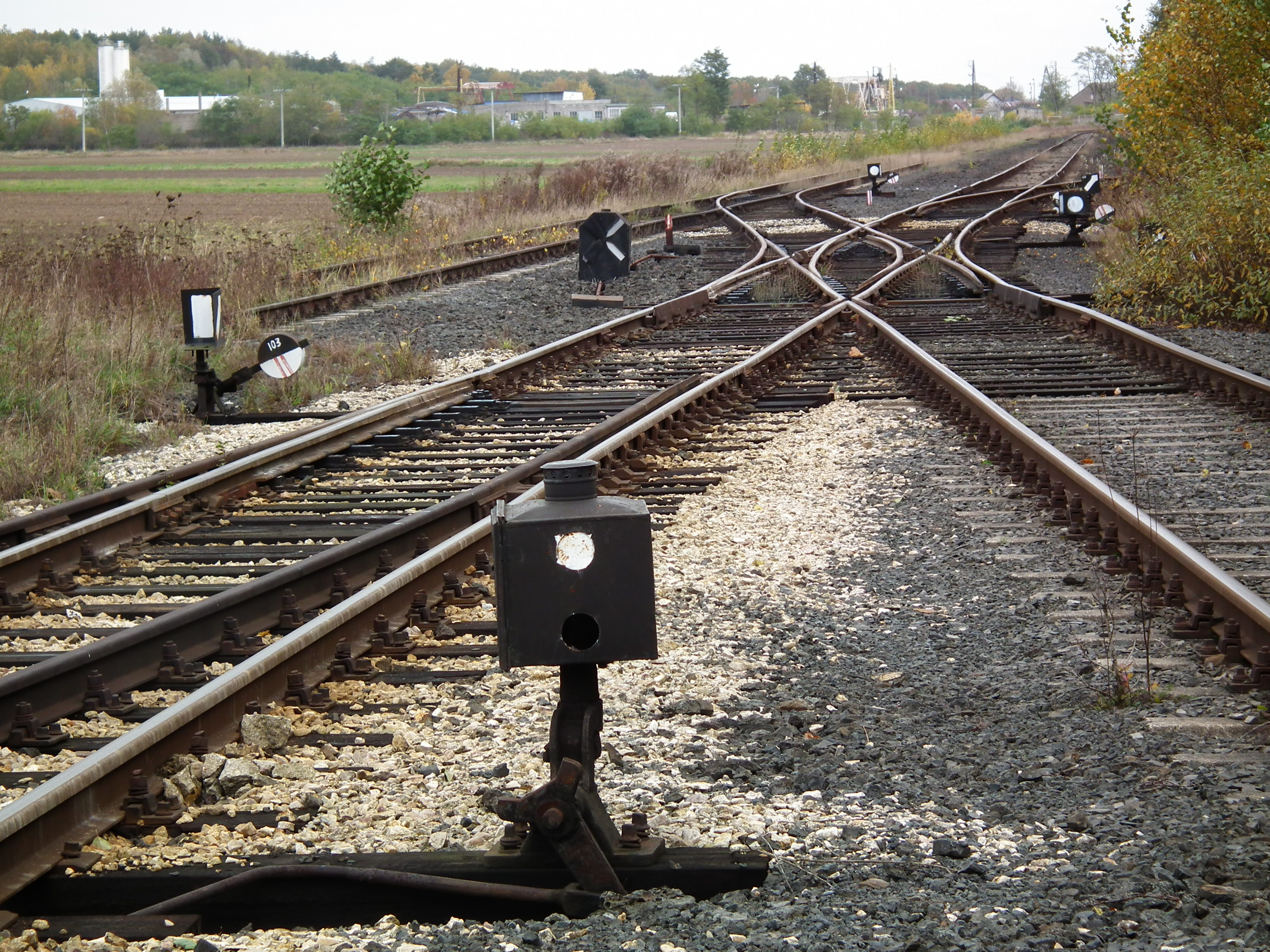 SA134-003 z pociągiem specjalnym Kolei Dolnośląskich podczas imprezy kolejowej Dolnośląskie Zakamrki III na liniach Dolnego Śląska i Łużyc. Stacja Pątnów Legnicki.